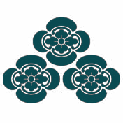 мон рода Асакура